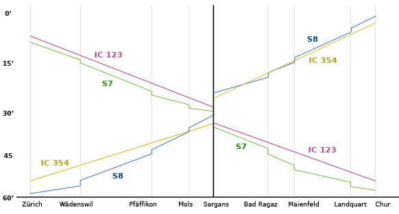 ein fiktiver Taktfahrplan